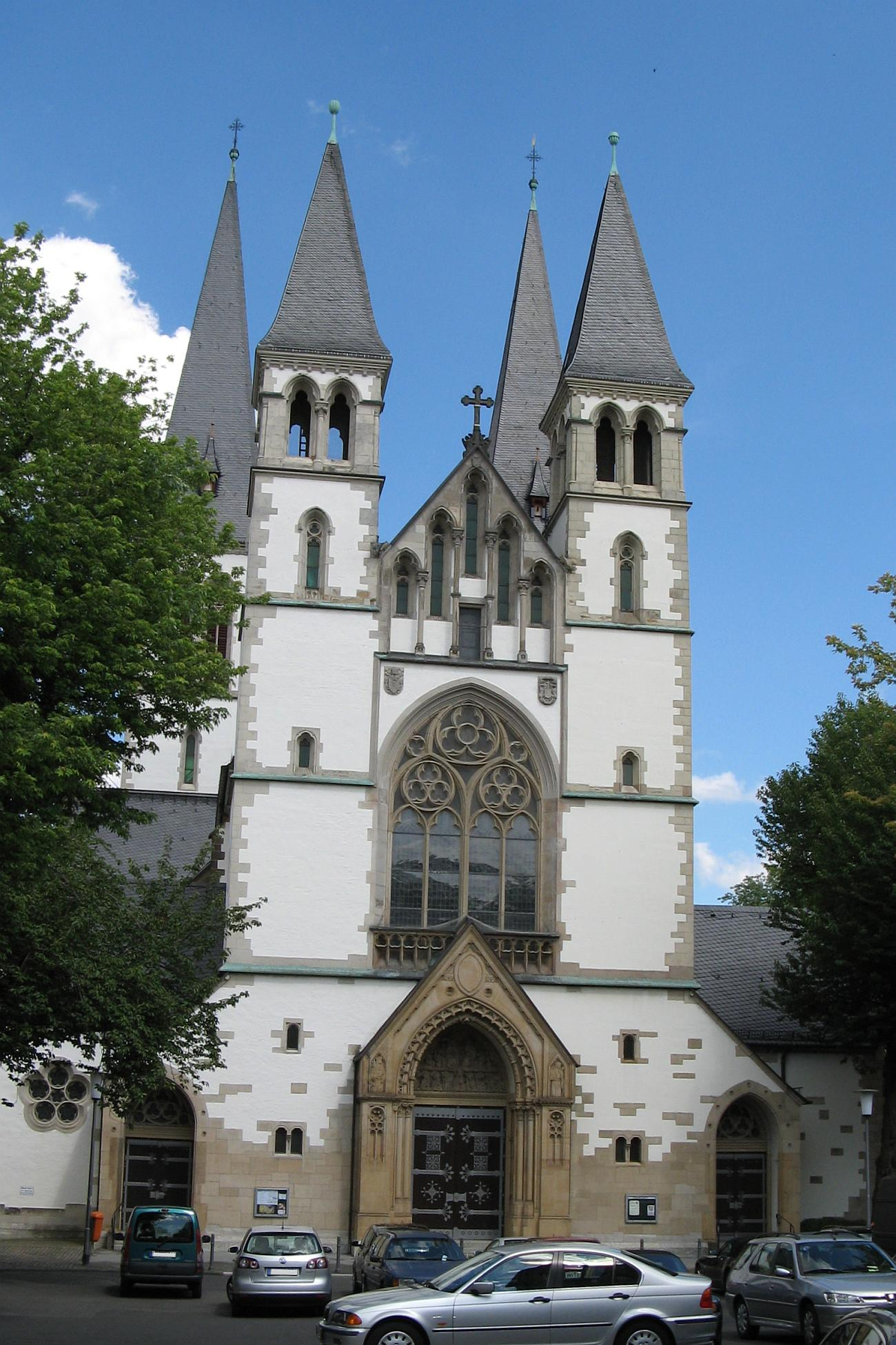 Das Westwerk der Dreifaltigkeitskirche in Wiesbaden